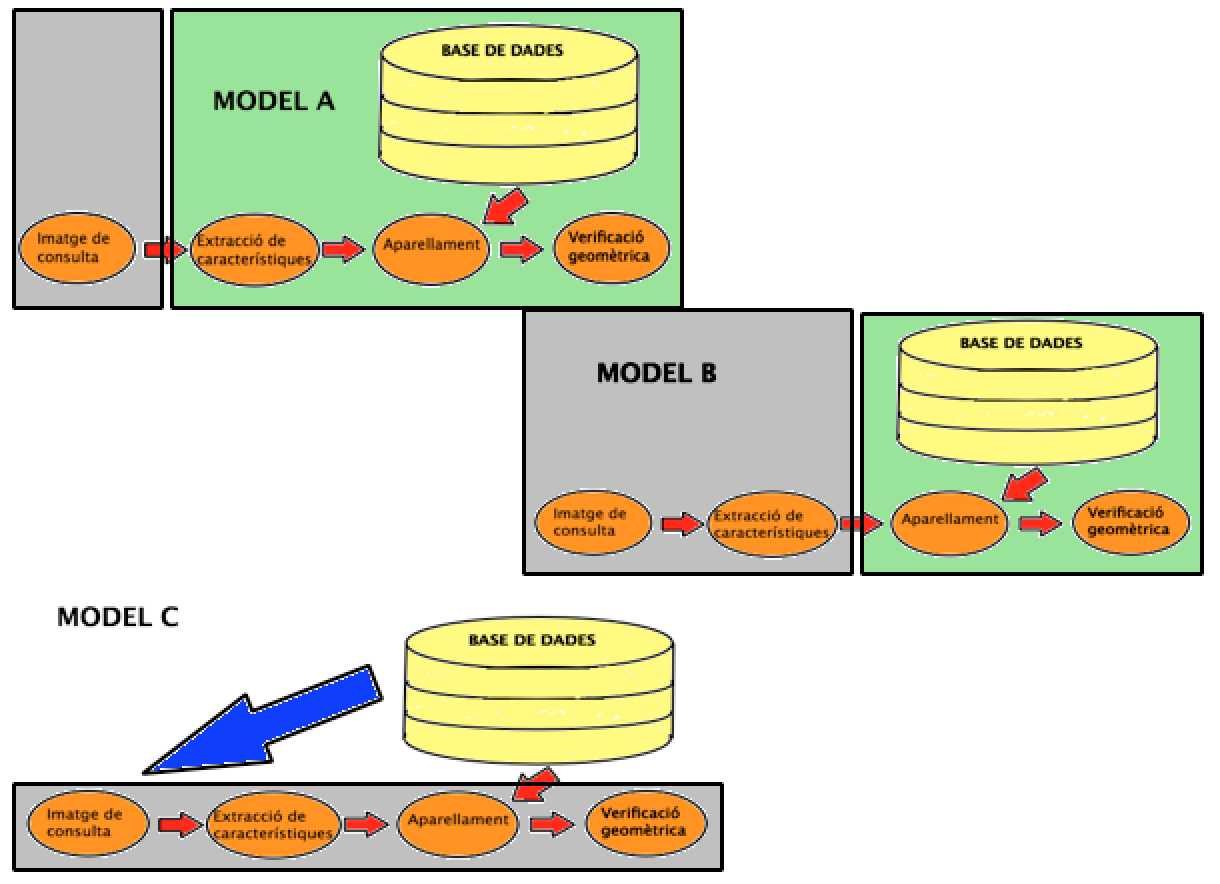 Diferentes tipologies de la cadena de cerca de contingut a partir d'una imatge. El model A mostra la situació en que el client envia la imatge al servidor perquè faci tot el procés. El model B mostra com el client extreu les característiques i les envia al servidor perquè faci el processat. El model C mostra la situació en què el client importa la base de dades i fa tot el processat.